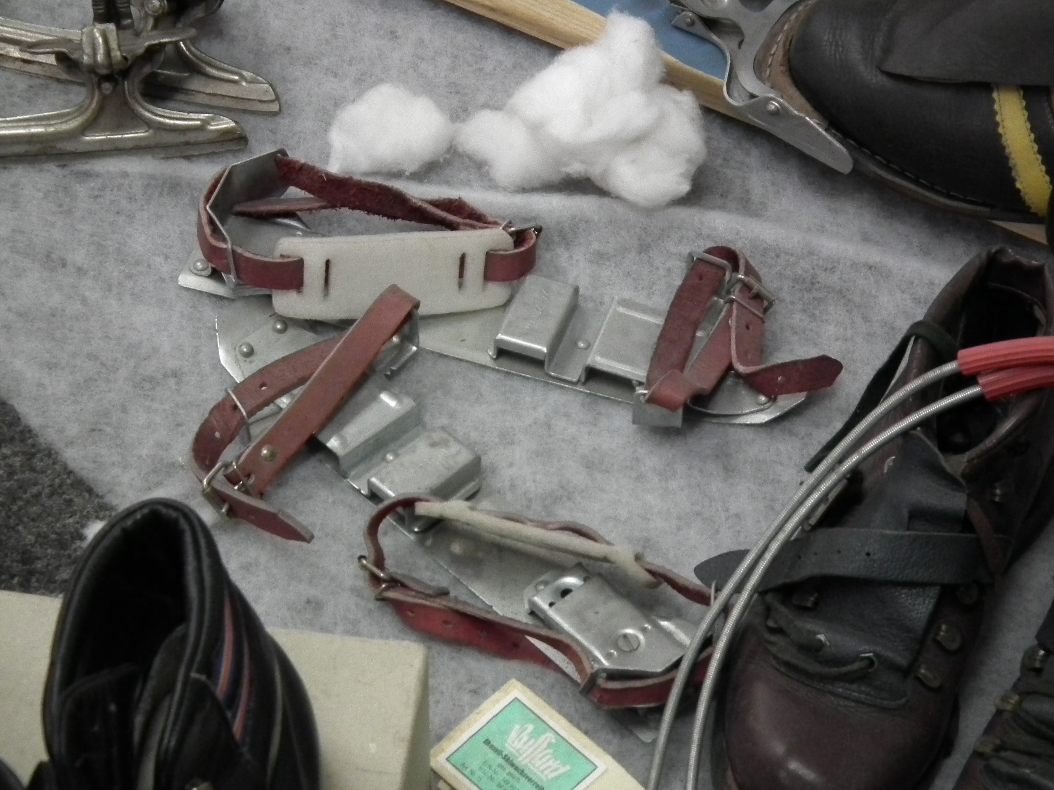 DDR Museum Zeitreise Radebeul, Gleitschuh, Fotografiert mit Genehmigung der Museumsleitung